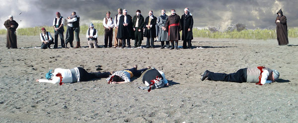 Montaje sobre la representación, en la playa de San Andrés, Málaga, del fusilamiento del General Torrijos y sus hombres (11 de diciembre de 1831). El homenaje está realizado por la Asociación Histórico-Cultural "Torrijos por la libertad" ( La fotografía y el montaje han sido realizados por Mariano Díaz.